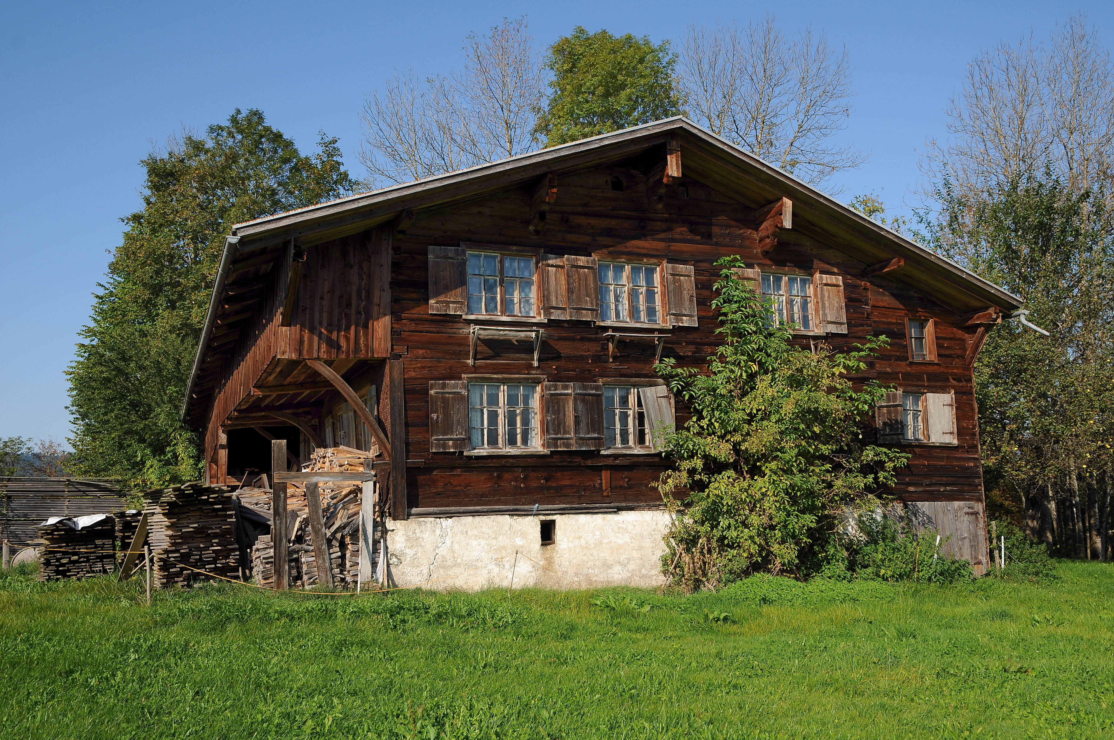 Bregenzerwälderhof im Engloch Nr.249 in Alberschwende.